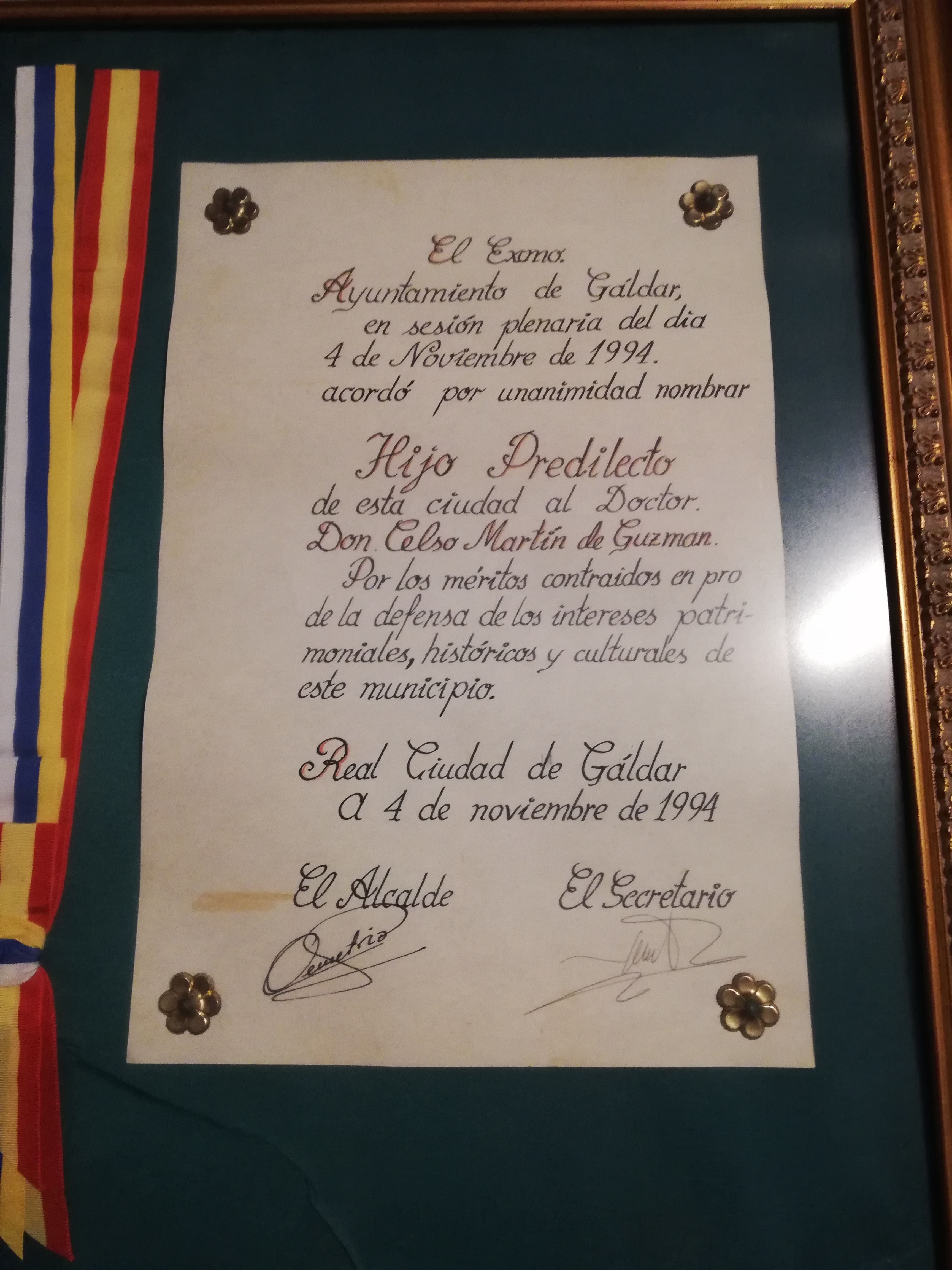 Titulo Hijo predilecto de Gáldar para Celso Martín de Guzmán